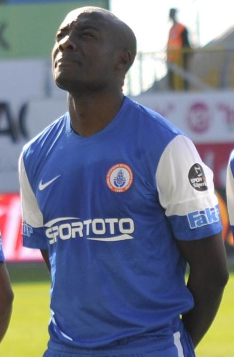 Antalyaspor maçı Pierre Webo Foto:Murat Özgen